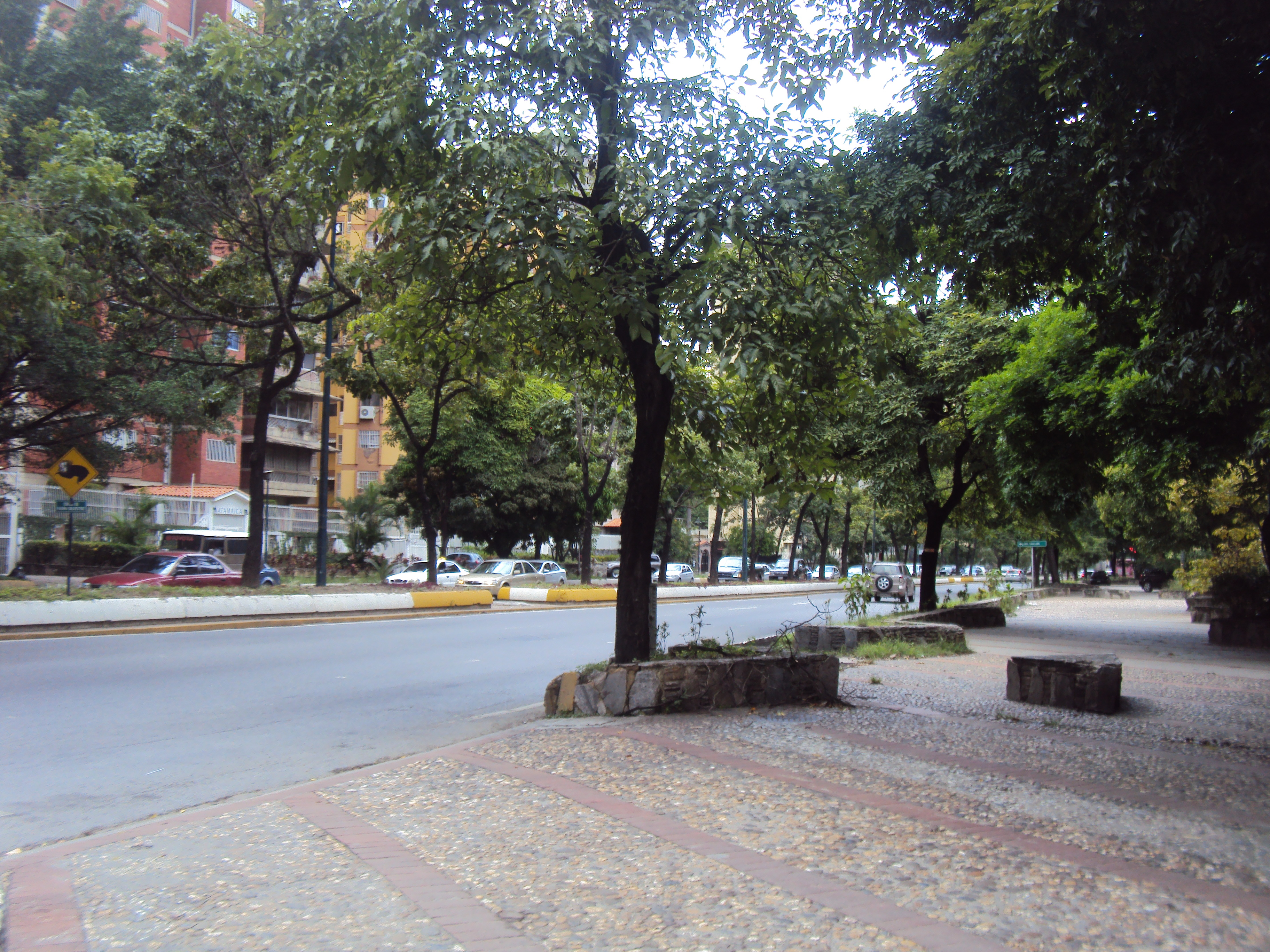 El boulevard Raúl Leoni abarca toda la Avenida Principal de El Cafetal, una de las avenidas más importantes de Caracas.